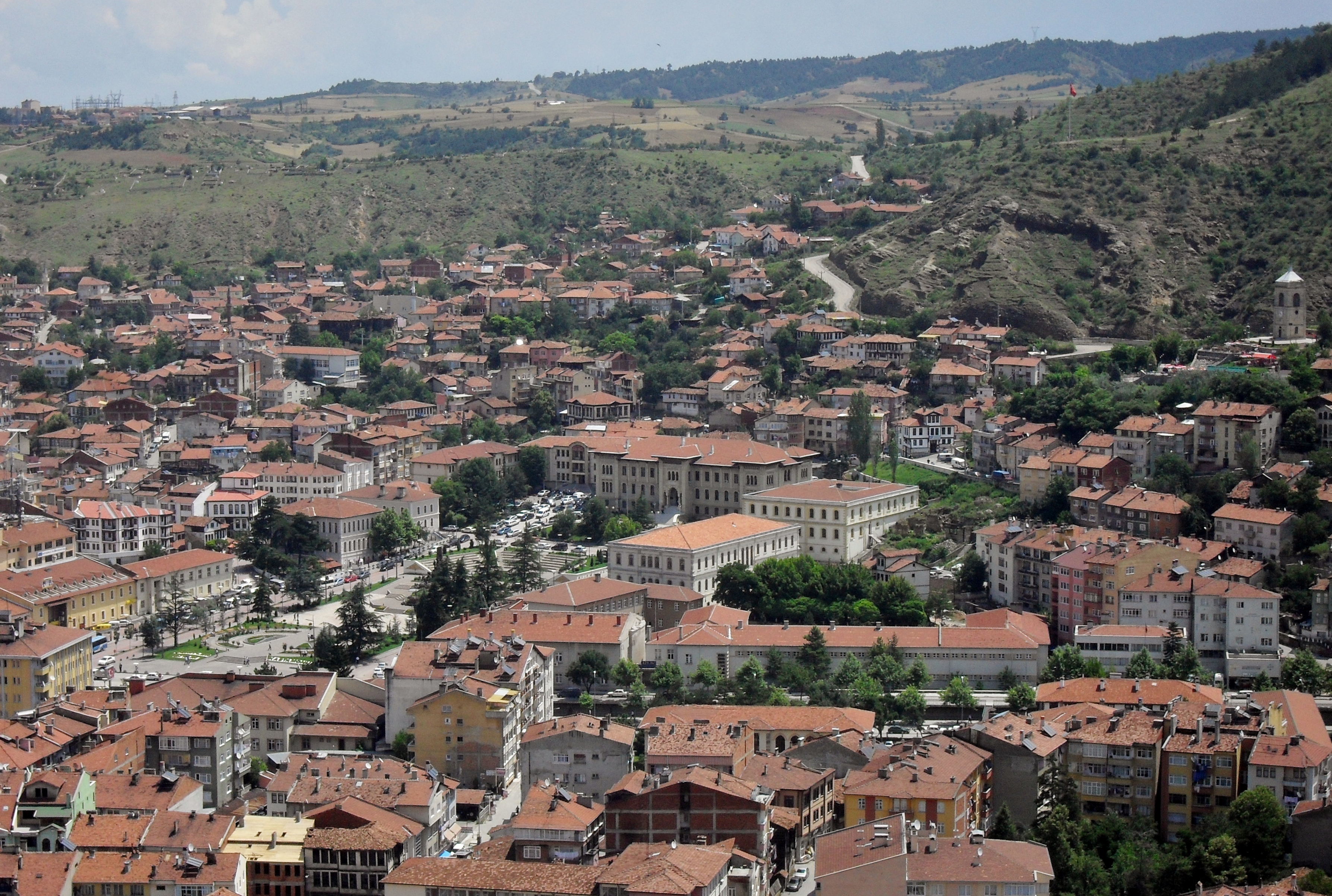 Kaleden Cumhuriyet Meydanı ve Çevresi